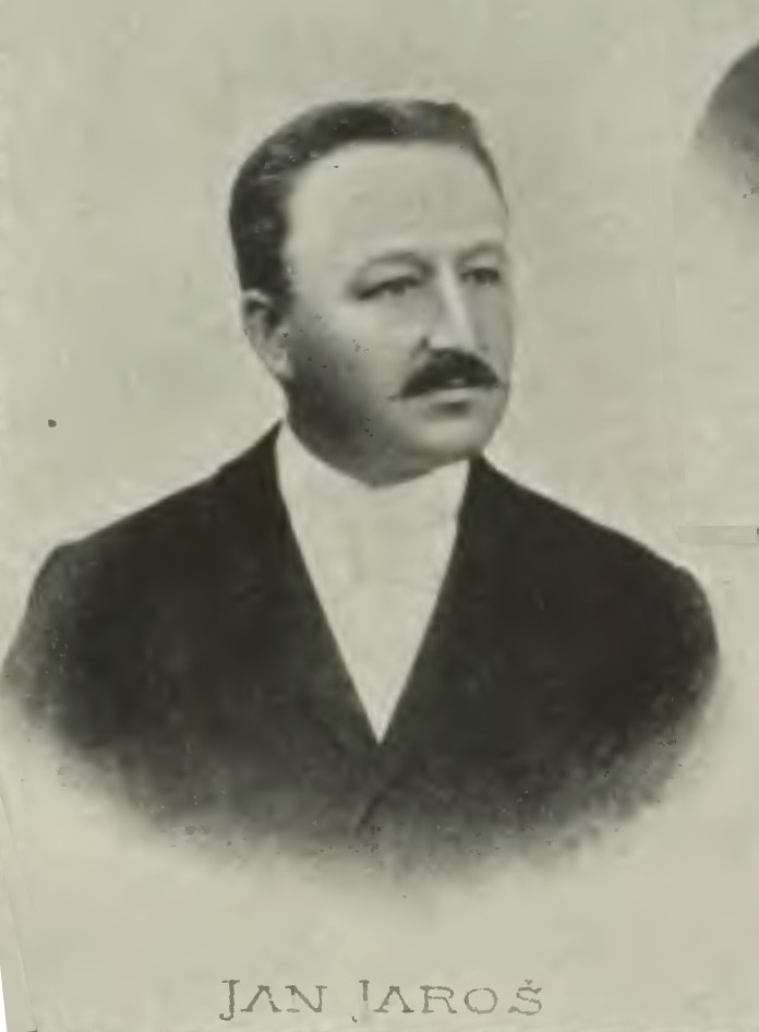 Portrét – Jan Jaroš (1853 - 1903), Český rolník a politik.